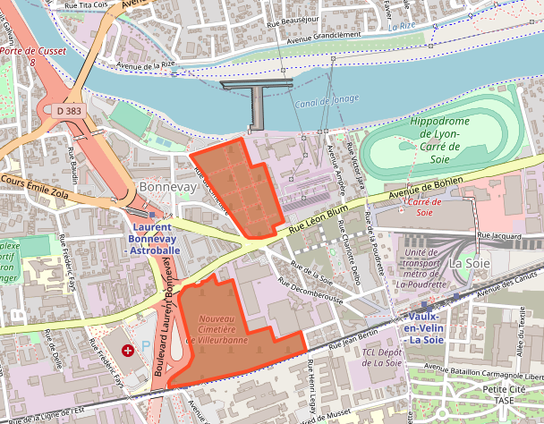 cimetières ancien et nouveau de Villeurbanne, carte issue d'OpenStreetMap. Relation incluant les deux cimetières.